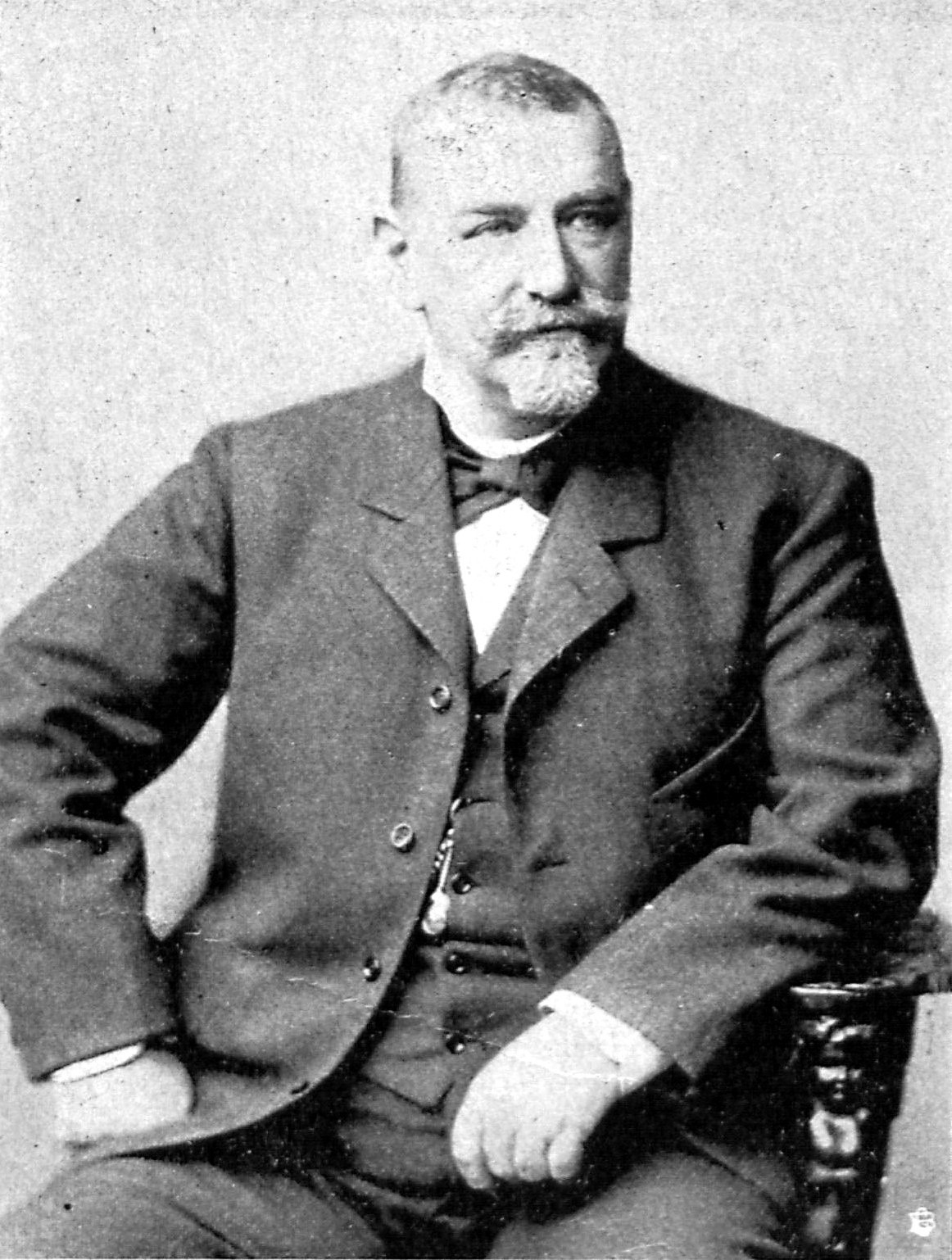 Hermann Fehling, dem als Präses der Handelskammer die Ehrendenkmünze der Handelskammer verliehen wurde.